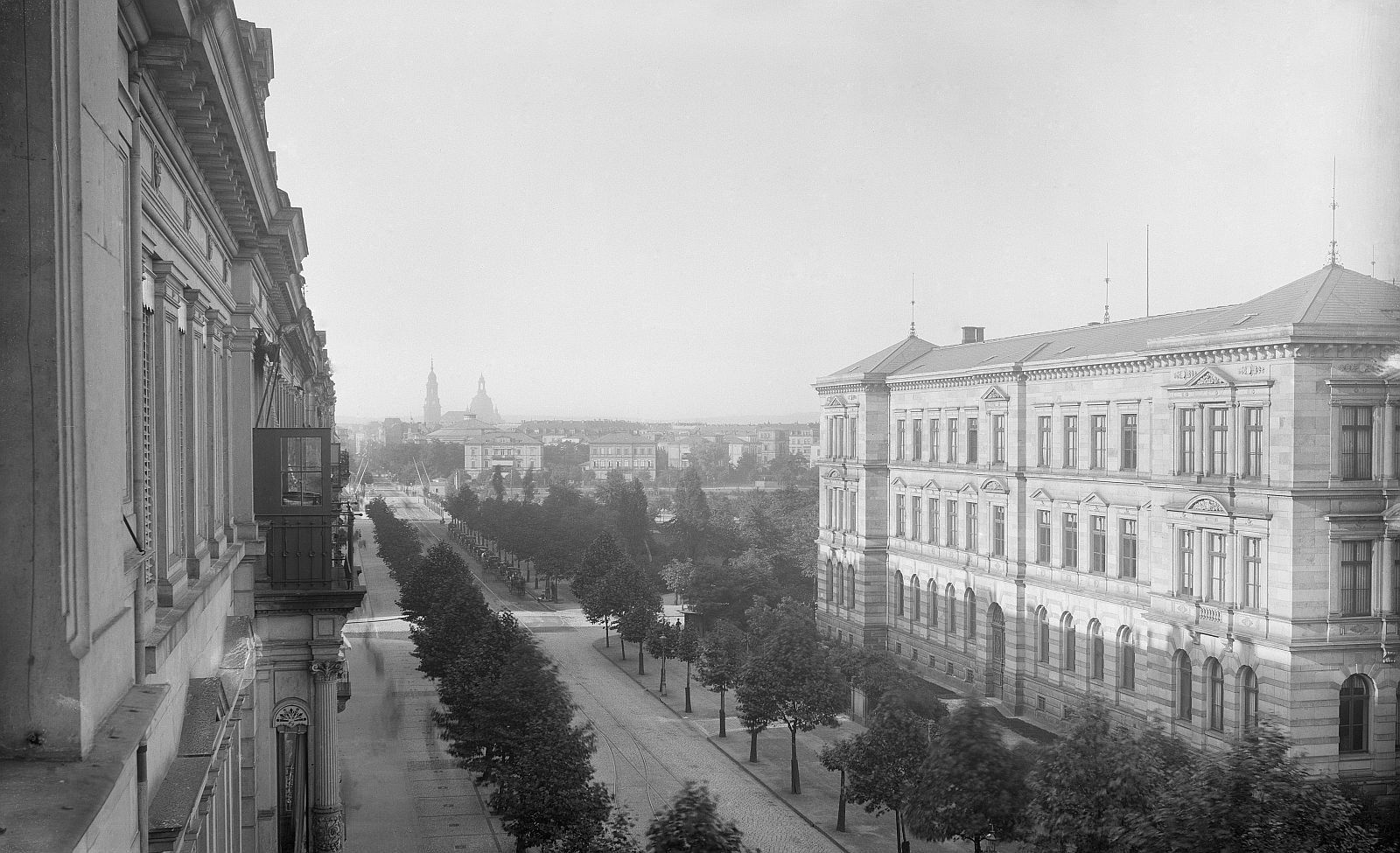 Blick von der Veranda des Künstlers [Ermenegildo Antonio Donadini] gegen das Gebäude der Technischen Hochschule, um 1890.Damalige Reichsstraße (Fritz-Löffler-Straße) mit Bismarckplatz (Friedrich-List-Platz). Rechts Hauptgebäude der Technischen Hochschule (zerstört). Im Hintergund Bahnübergang am Böhmischen Bahnhof (heute Hochgleise), Panorama-Kuppelbau und Innenstadt.